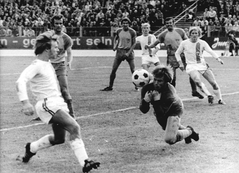 ADN-ZB-Link-23-8-75-ma-Berlin: Fußball-Oberligaspiel BFC Dynamo - FC Vorwärts Frankfurt-Oder 7:1- Frankfurts Torwart Eckhard Kreutzer kann den Ball nicht festhalten, doch auch die beiden Berliner Wolf-Rüdiger Netz (vorn links) und Hans-Jürgen Riediger (Im Hintergrund rechts) erreichen das tückische Leder nicht mehr.